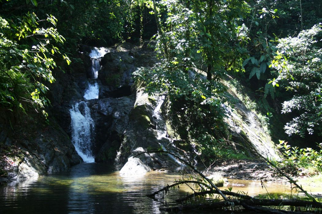 Costa Rica: Prov. Puntarenas, La Gamba NW Golfito, Catarata "El Chorro"